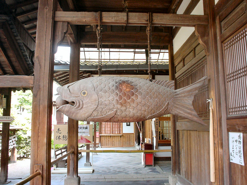 投稿者撮影 2005/05/05